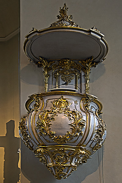 Kanzel der Stadtkirche Durlach